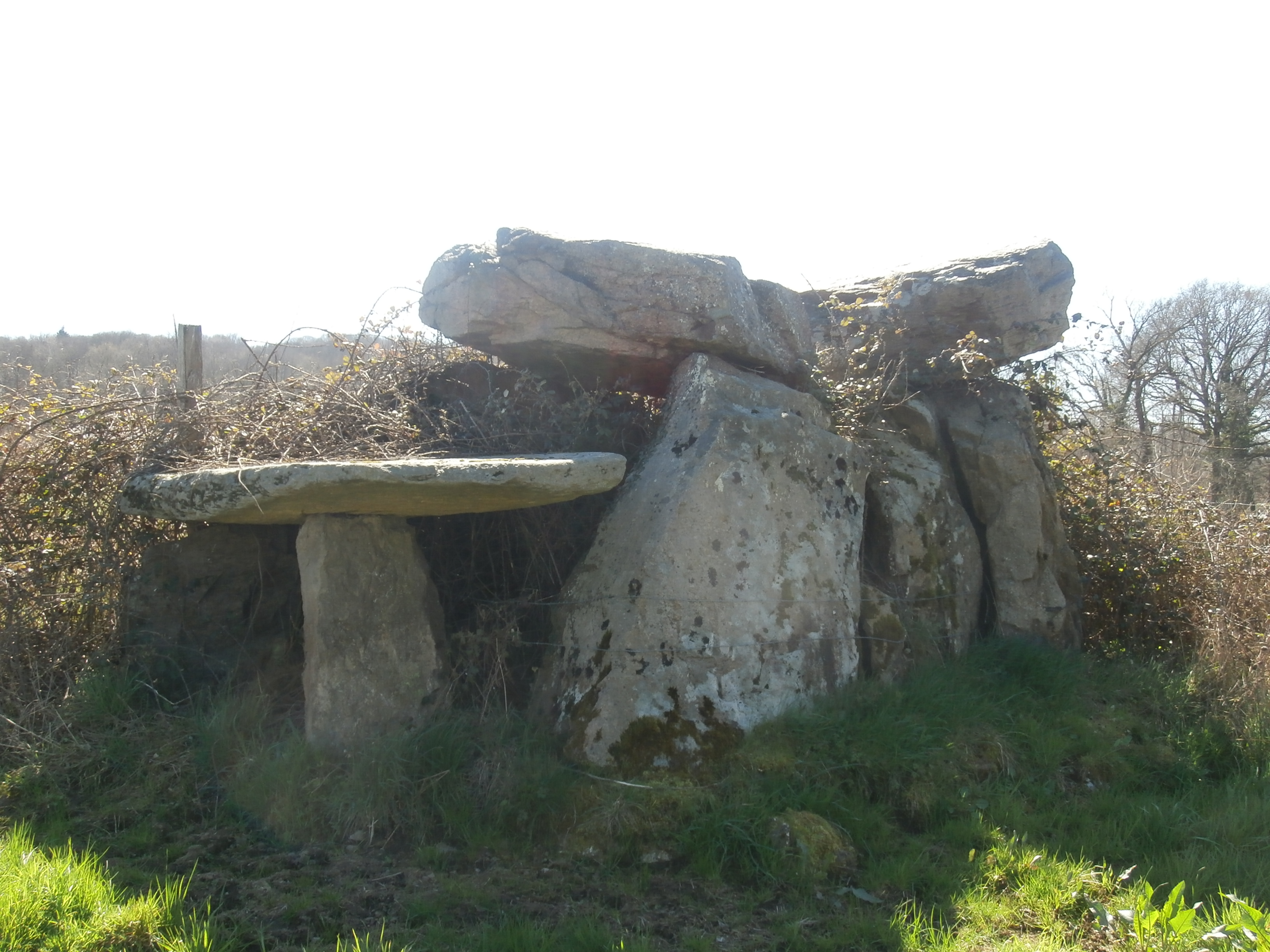 Dolmen : France, Limousin, Creuse, Dun-le-Palestel